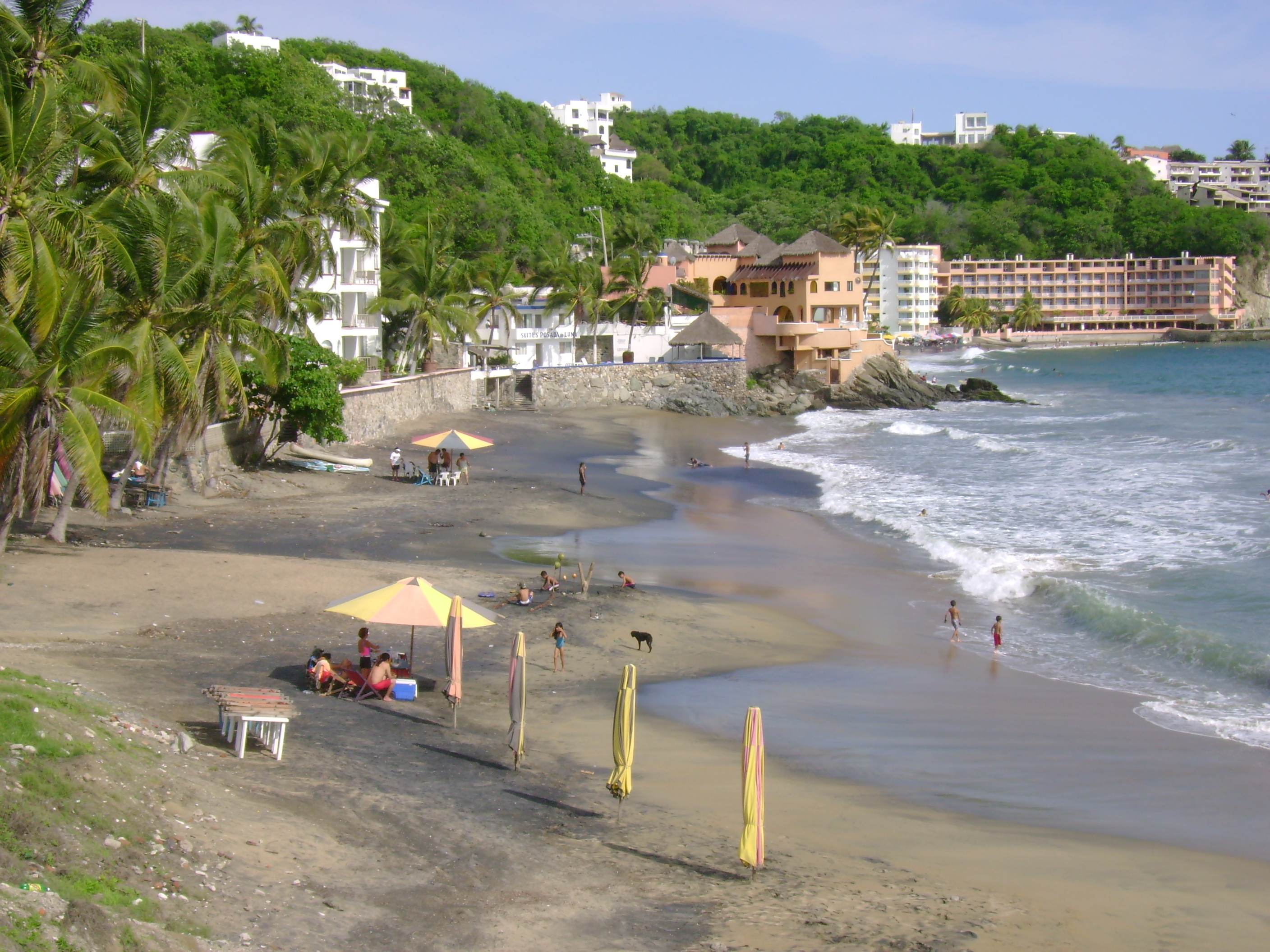 Panorámica de la Playa Santiago, en Ohio.